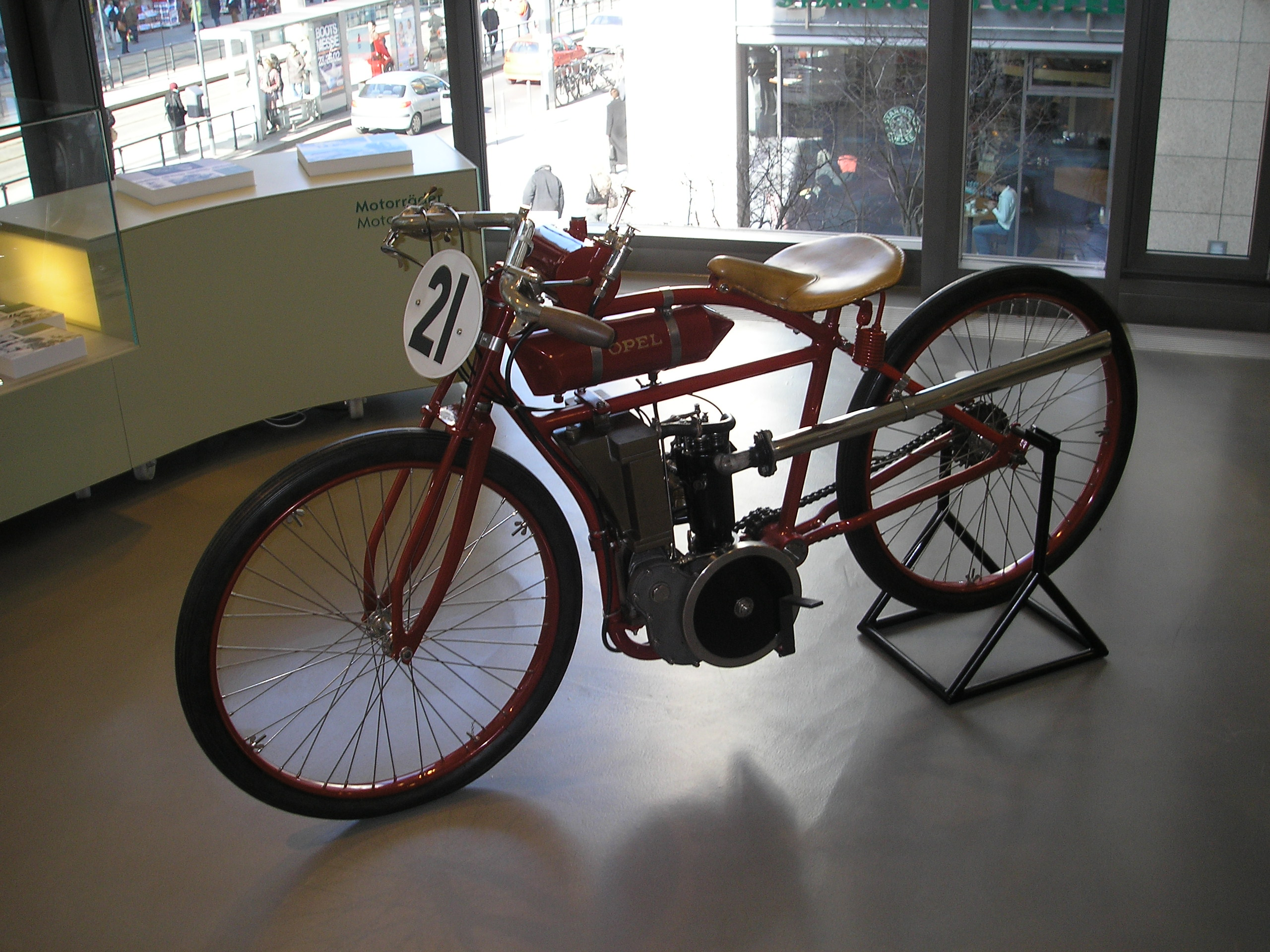 Description: sogenannte Opel Bahnrennmaschine, im Opel Zentrum in Berlin an der Friedrichstraße. Baujahr 1912/22. Es gibt keine Schutzbleche, Bremsen, Federung, Getriebe oder Kupplung. Durch die Leichtigkeit war es ein sehr erfolgreiches Model. Red circuit racing bike, used around 1912/22. There are no fenders, brakes, springs, gearbox or clutches, making it very light and extremely successful in races. Source: self-made, I release it into the public domain. Gryffindor 17:28, 9 March 2006 (UTC)